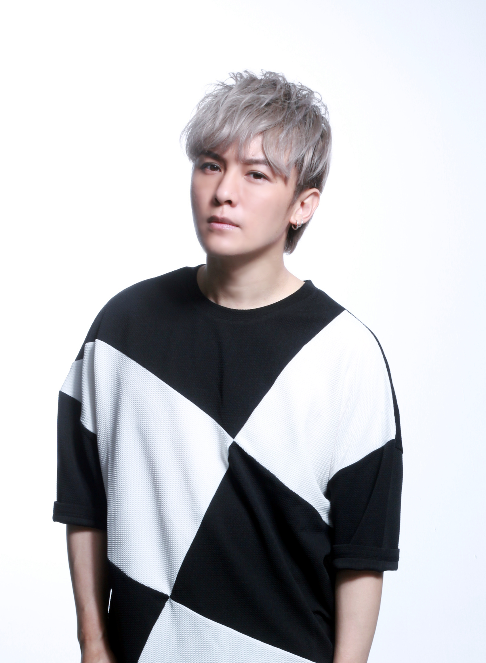 金志遙JIN